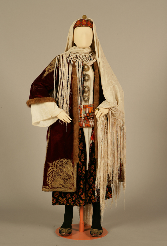 Νυφική ή γιορτινή φορεσιά Καστελόριζο, Δωδεκάνησα. Τέλη 19ου αιώνα Συλλογή Πελοποννησιακού Λαογραφικού Ιδρύματος, Ναύπλιο